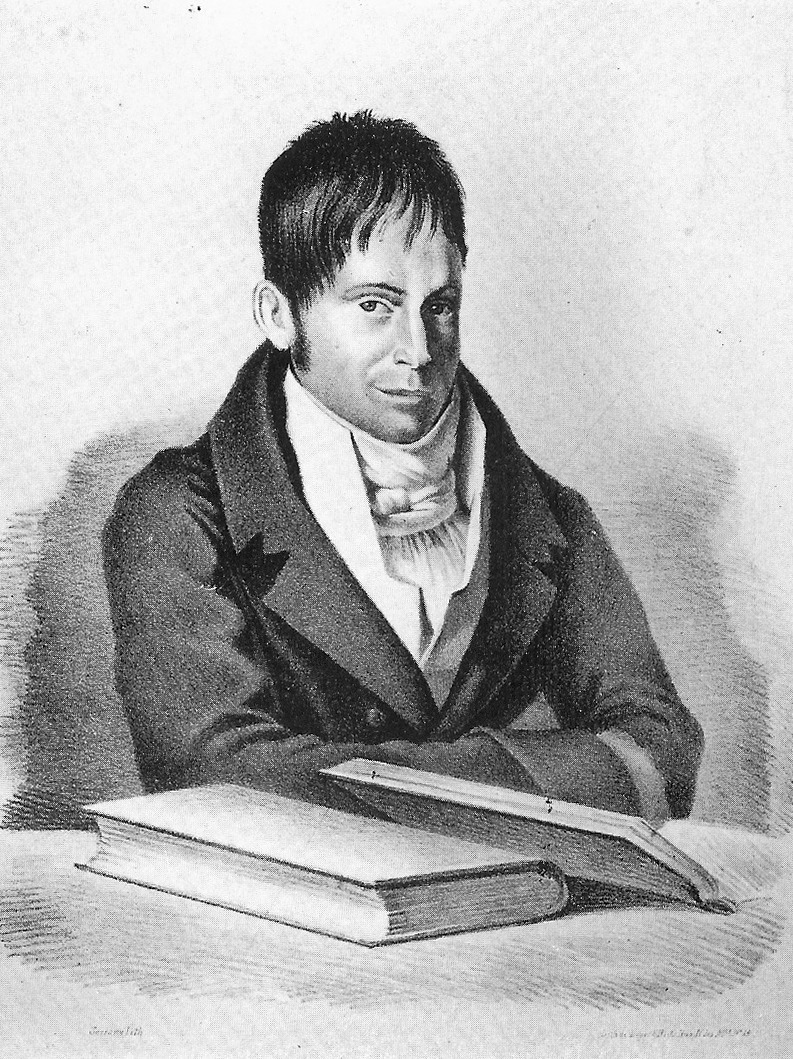 Bernardino António Gomes(1768—1823)